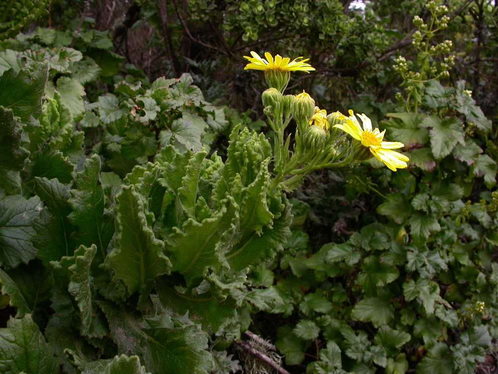 Senecio planiflorus